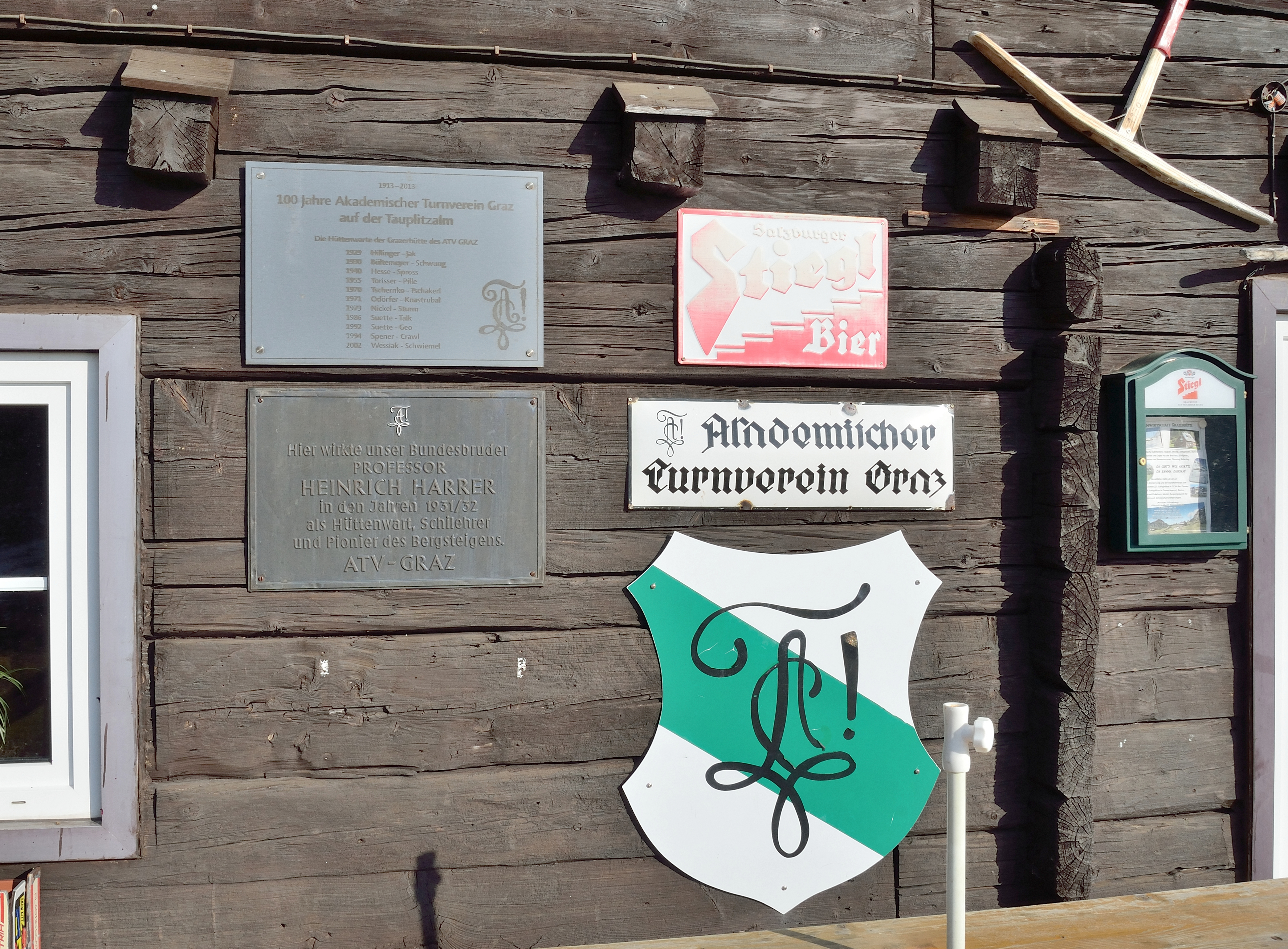 Die Grazerhütte auf der Tauplitzalm gehört dem akademischen Turnverein Graz (ATV Graz)